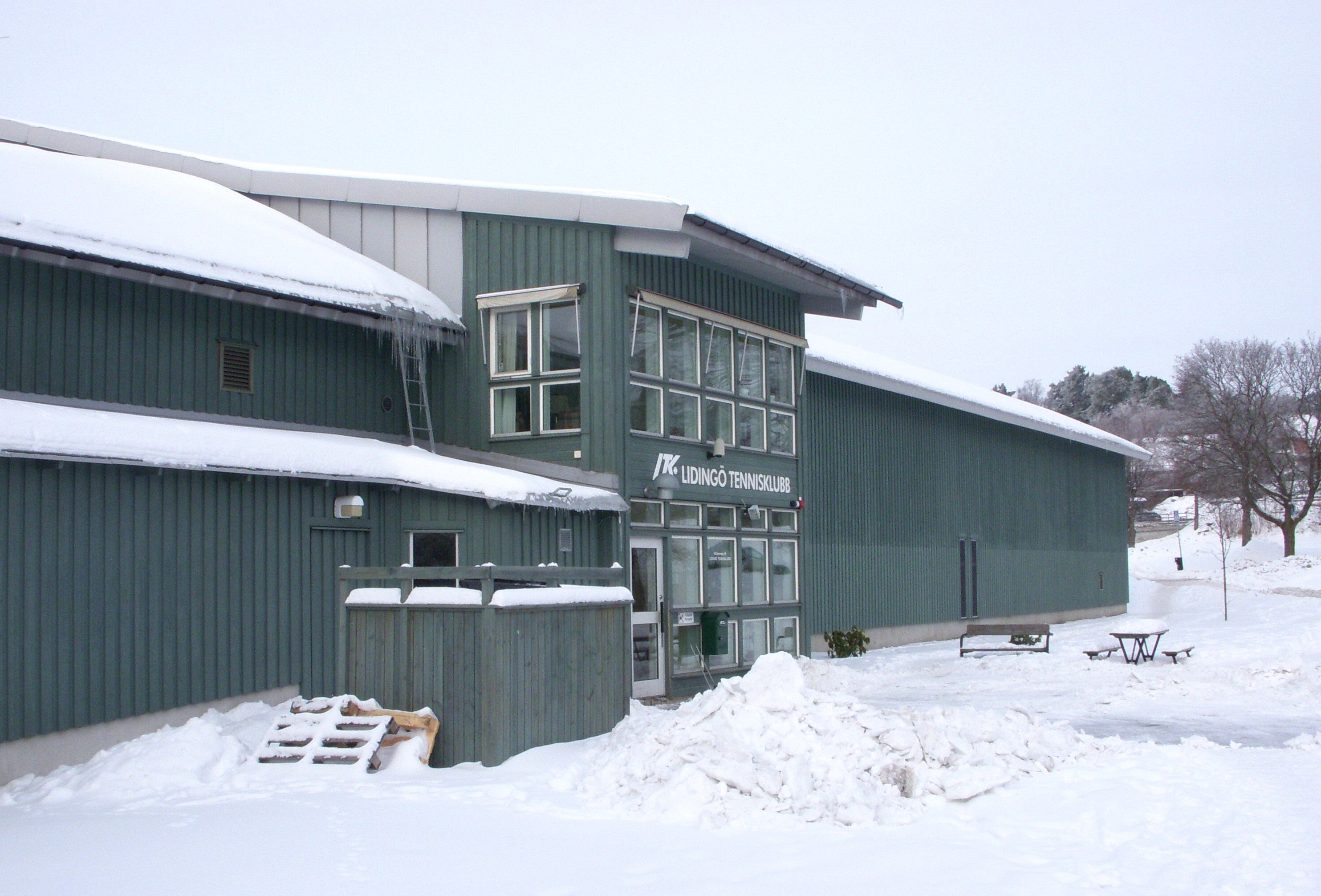 Lidingö tennishall och Lidingö tennisklubb